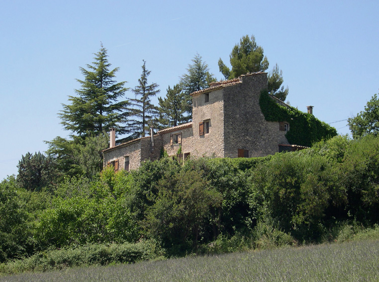 Mas du XVIIIe près de Viens. Canton d’Apt. Département de Vaucluse. Région Provence-Alpes-Côte d'Azur. France